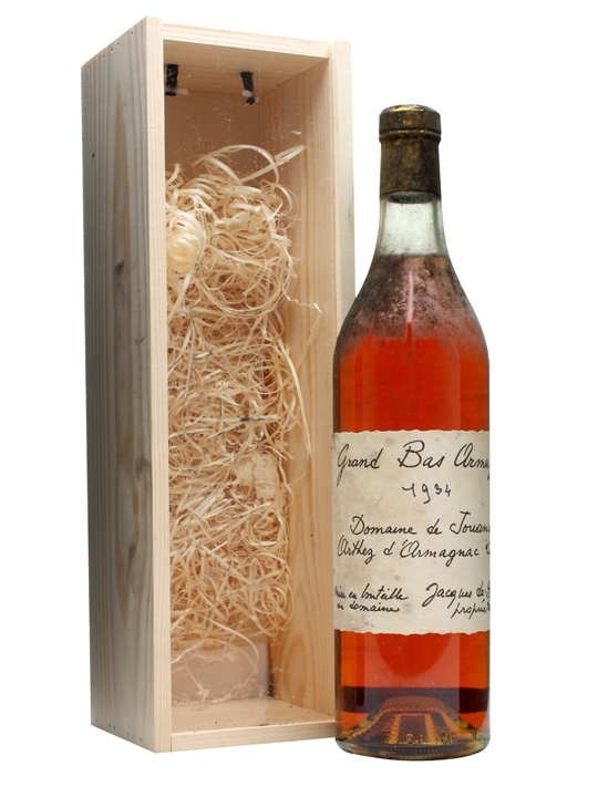 Ба-Арманьяк Домен Жоанда